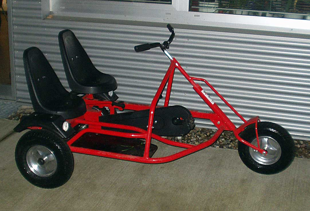 Dreirad-fuer-zwei